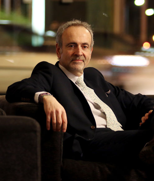 Albúm conferencia Córdoba